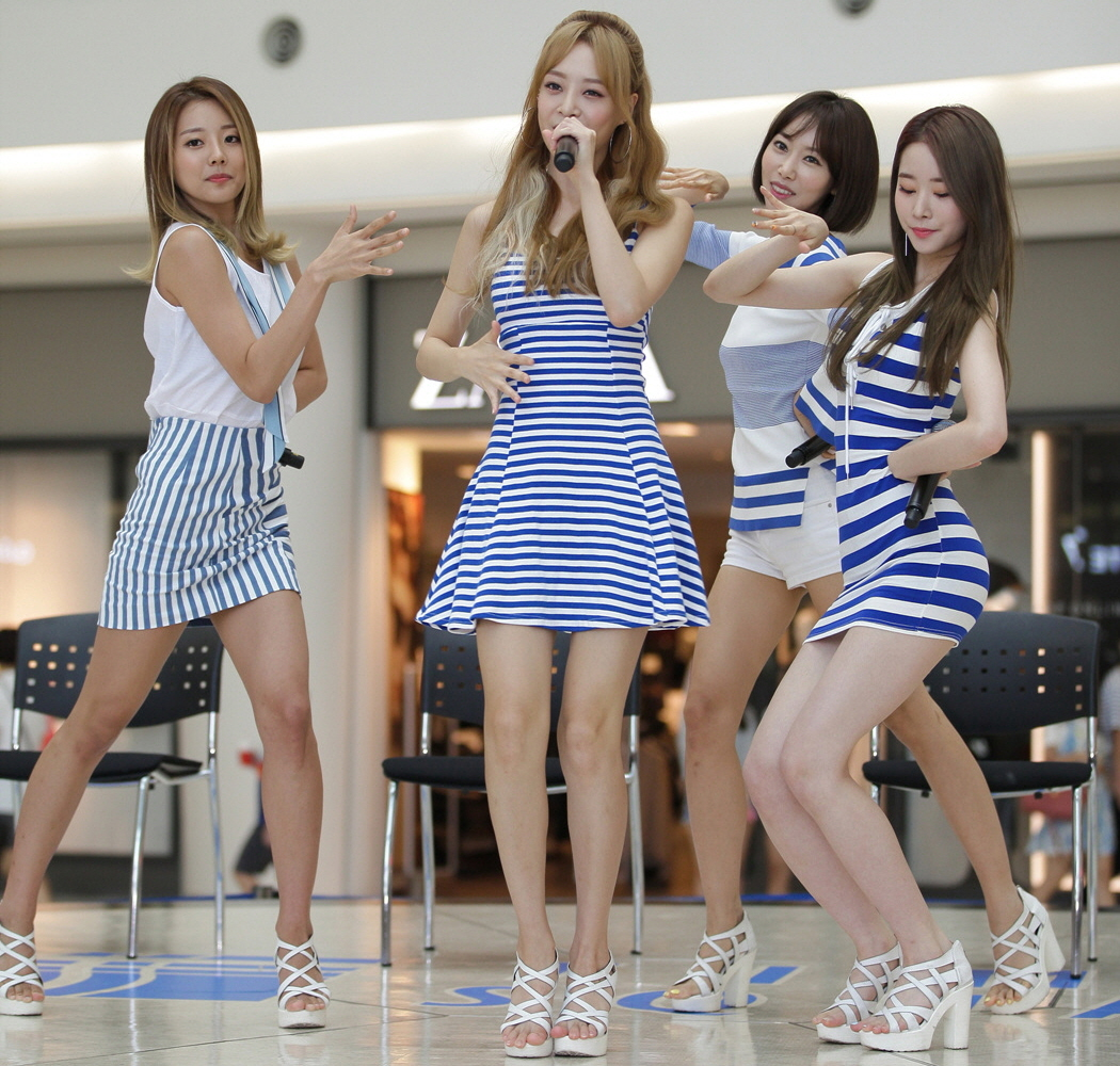 멜로디데이(MelodyDay) 영등포 타임스퀘어 문화공연